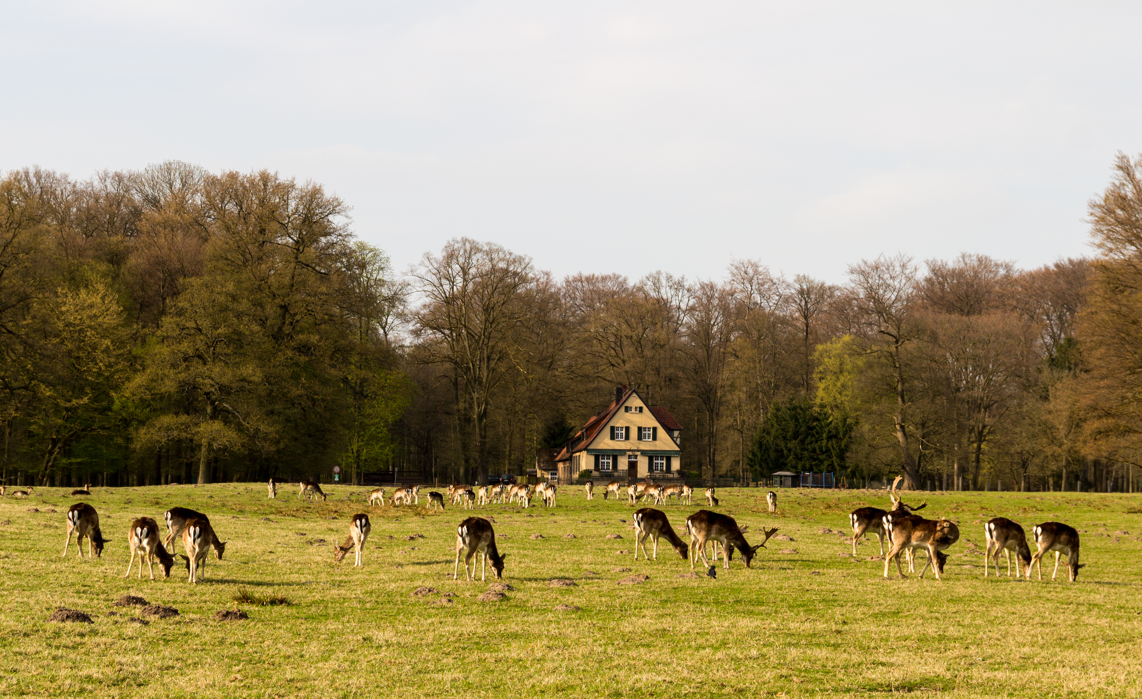 Wildpark mit Forsthaus, Dülmen, Nordrhein-Westfalen, Deutschland This image shows a heritage building in Germany, located in the North Rhine-Westphalian city Dülmen (no. 61).